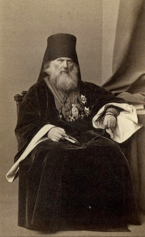 Платон (Городецкий), архиепископ Рижский и Митавский.